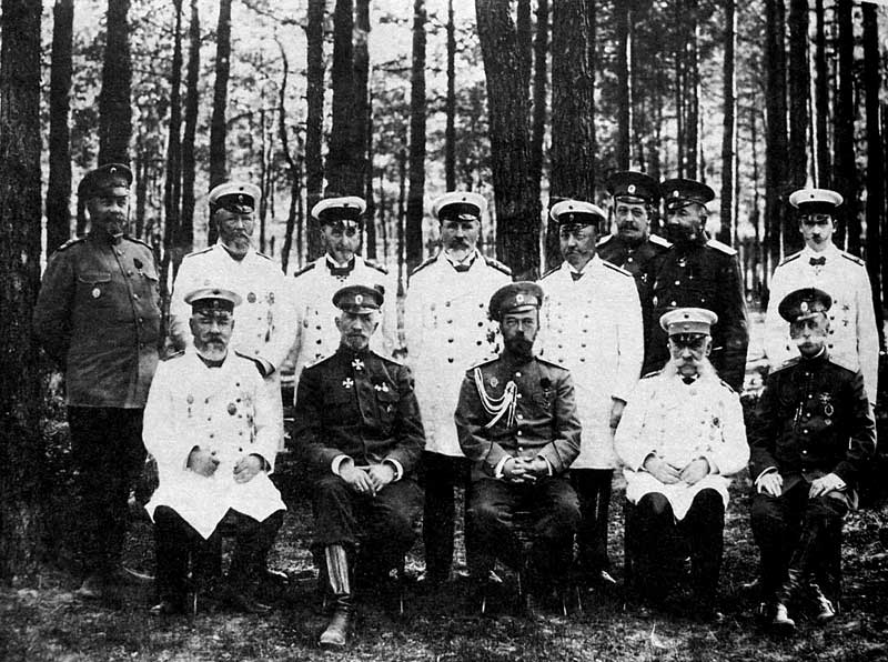 Совет министров, Царская ставка. Станция Барановичи, 14 июня 1915г.Совет министров. В первом ряду: государственный контролер П.А. Харитонов; великий князь Николай Николаевич (младший); Николай II; председатель Совета министров И.Л. Горемыкин; министр императорского двора и уделов, генерал-адъютант граф В.Б. Фредерикс. Во втором ряду: министр внутренних дел князь Н.Б. Щербатов; министр путей сообщения С.В. Рухлов; министр иностранных дел С.Д. Сазонов; главноуправляющий землеустройством и земледелием А.В. Кривошеин; министр финансов П. Л. Барк; начальник штаба Верховного главнокомандования, генерал от инфантерии Н.Н. Янушкевич; управляющий Военным министерством генерал от инфантерии А.А. Поливанов; министр торговли и промышленности кн. В.Н. Шаховской.